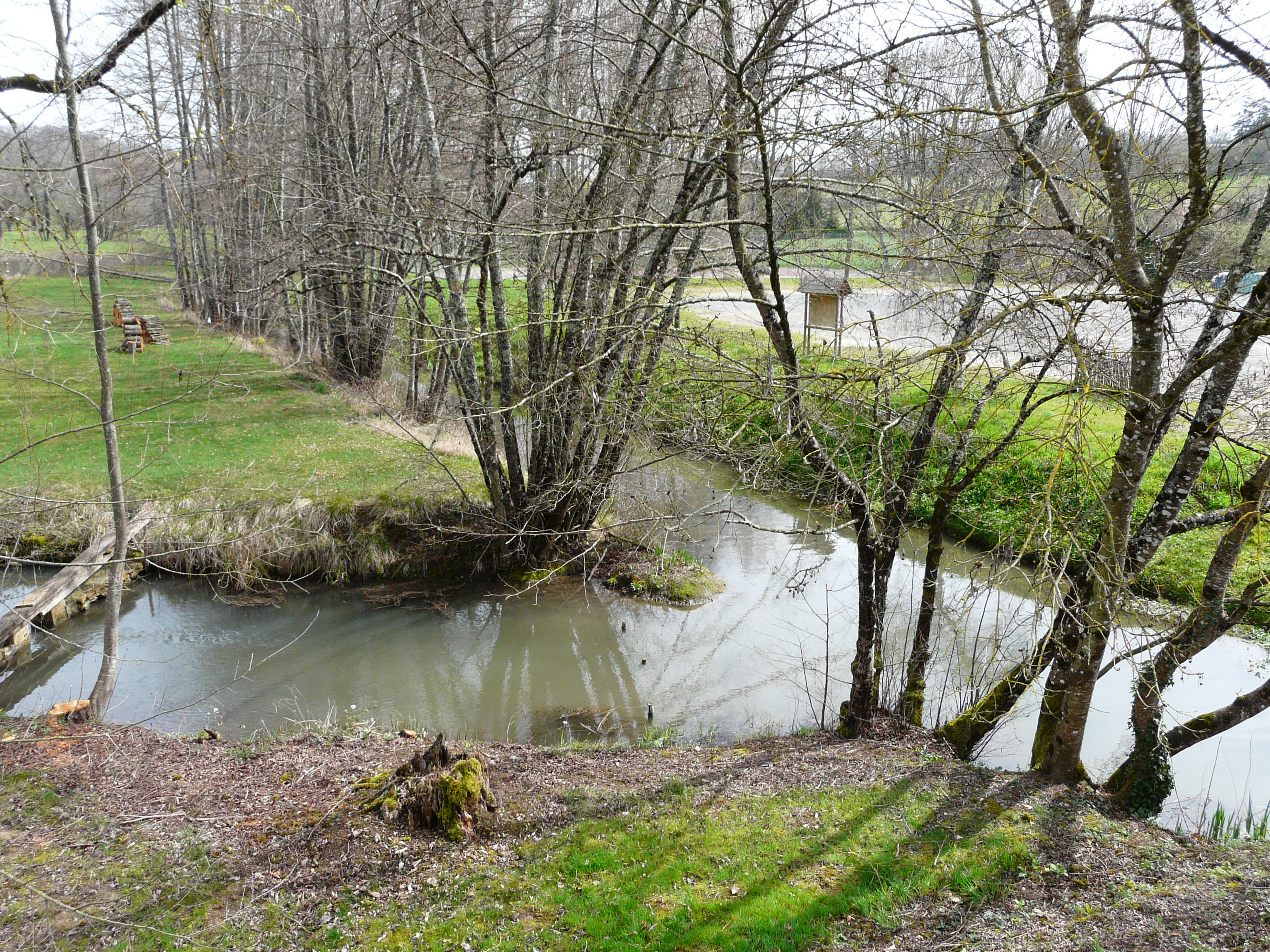 La Crempse à Pont-Saint-Mamet, Douville, Dordogne, France. Vue prise en direction de l'amont.